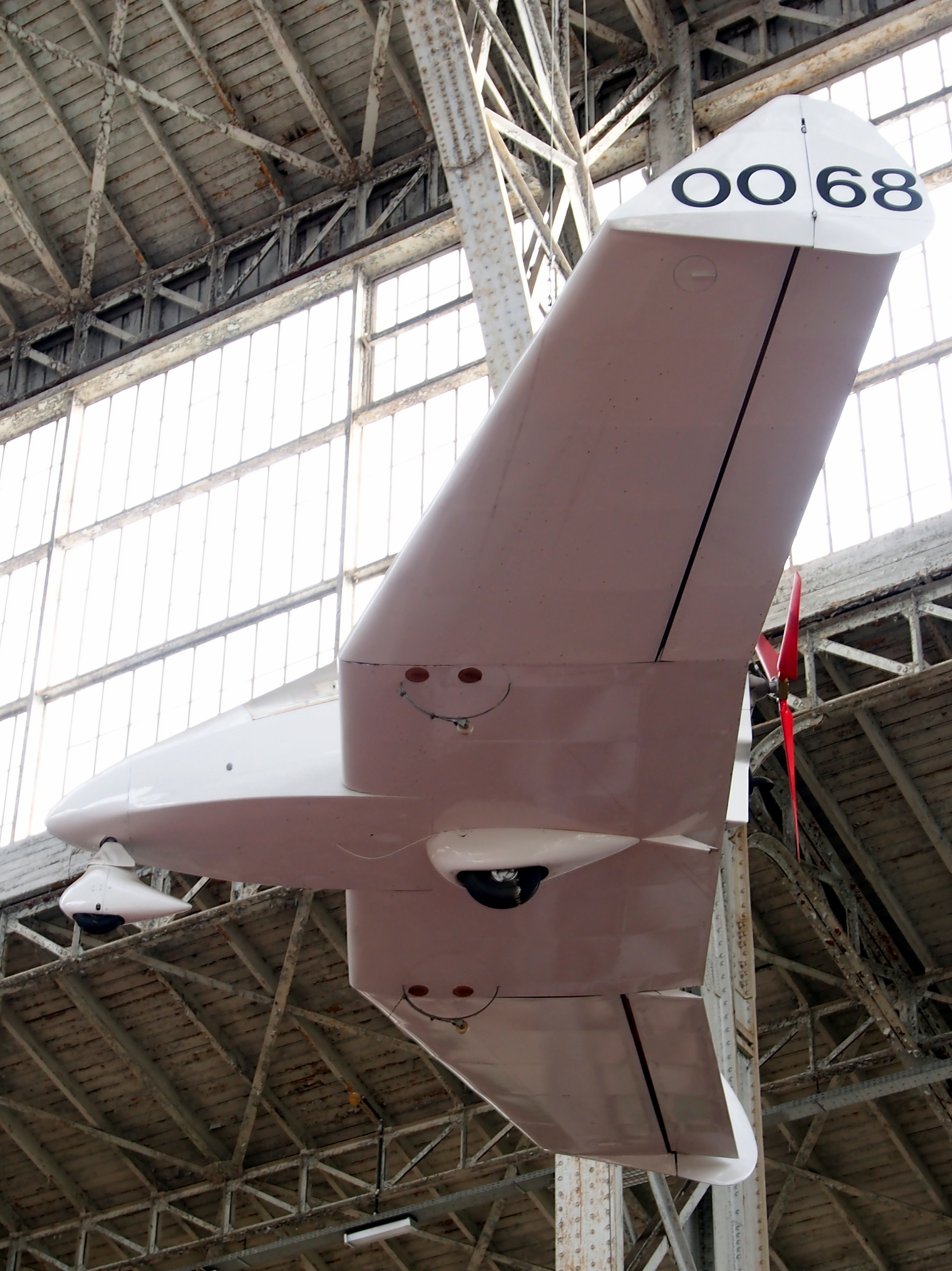 Pottier P40, OO-68.